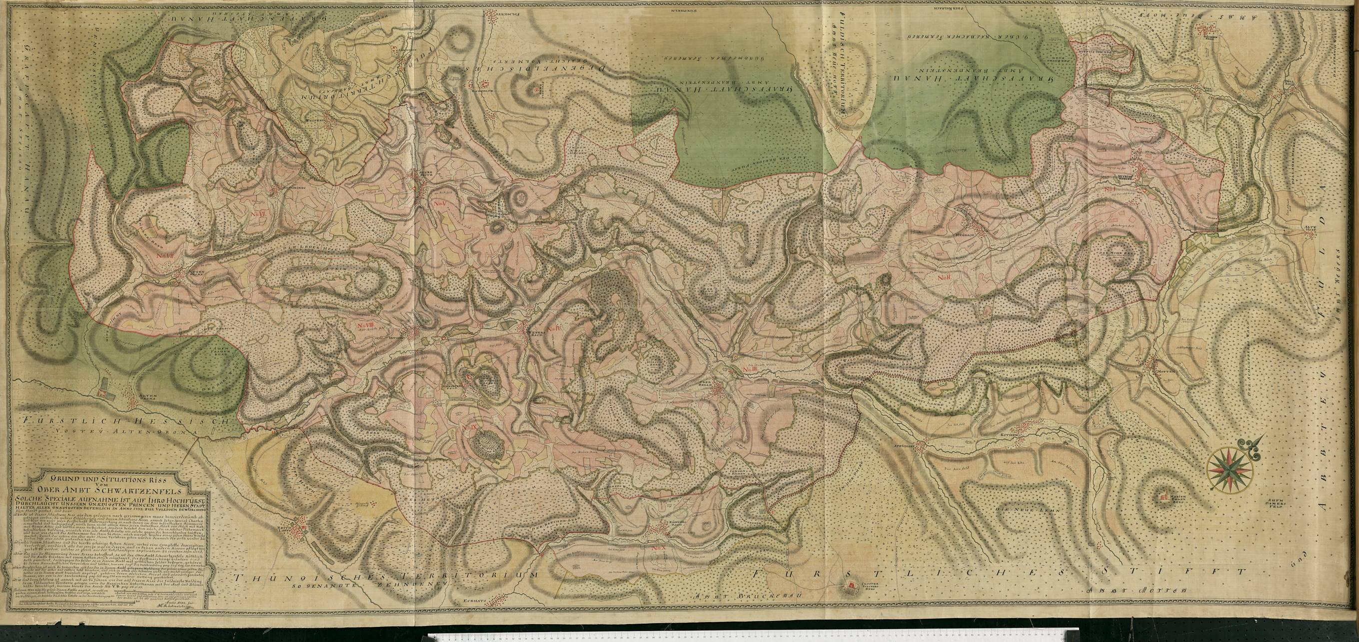 Karte des Oberamts Schwarzenfels, mit Darstellung von Neuengronau, Breunings, Sterbfritz, Mottgers, Schwarzenfels, Züntersbach, Weichersbach, Oberzell, Heubach, Uttrichhausen, Döllbach, Büchenberg, Zillbach, Altenhof, Motten, Maria Ehrenberg, Kothen, Speicherz, Kloster Volkersberg, Zeitlofs, Altengronau, Weiperz, Sannerz, Ramholz, 1732 (Hessisches Staatsarchiv Marburg Karten Nr. R II 29). Zum Archivale